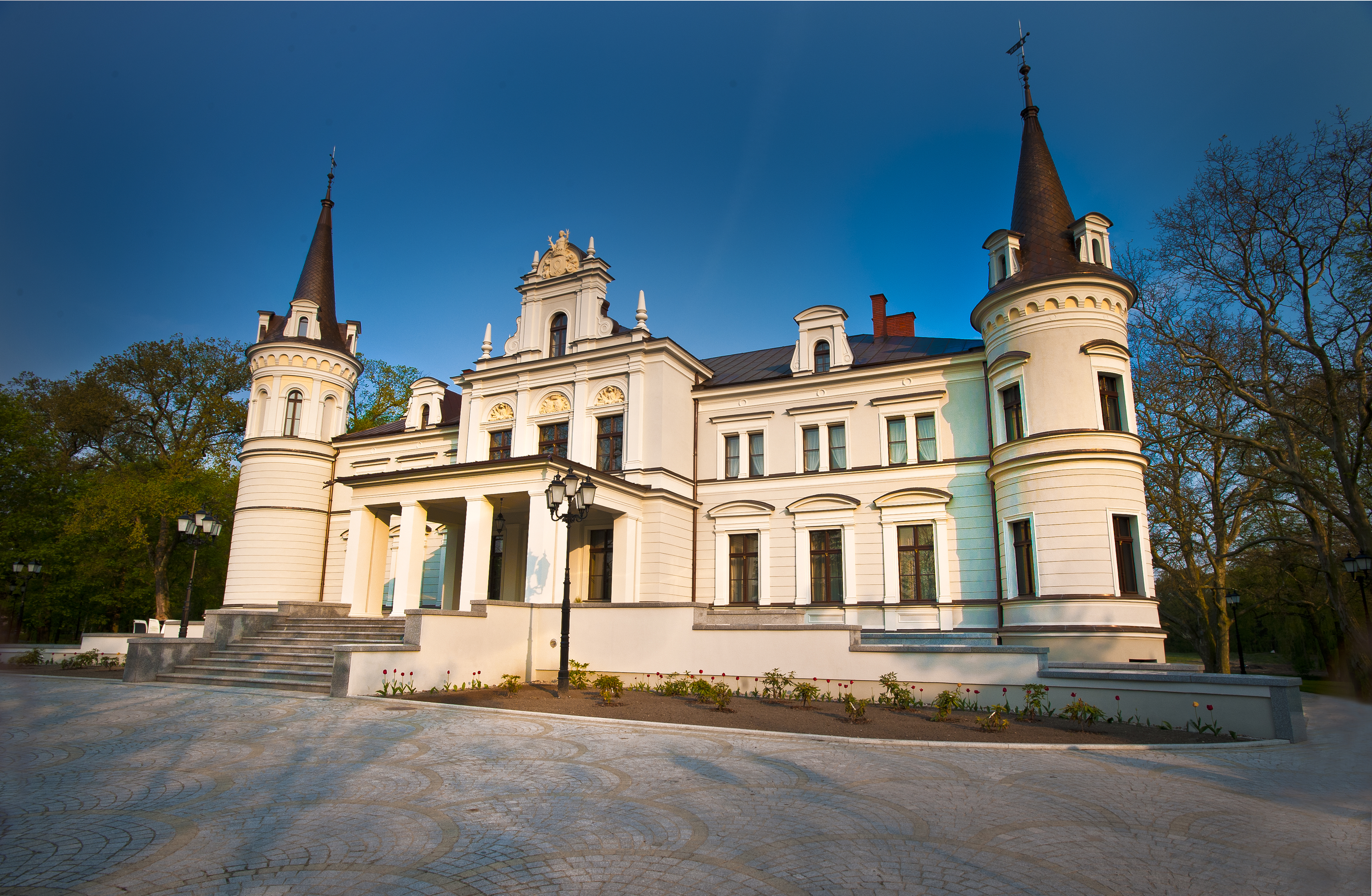 Pałac Tarce